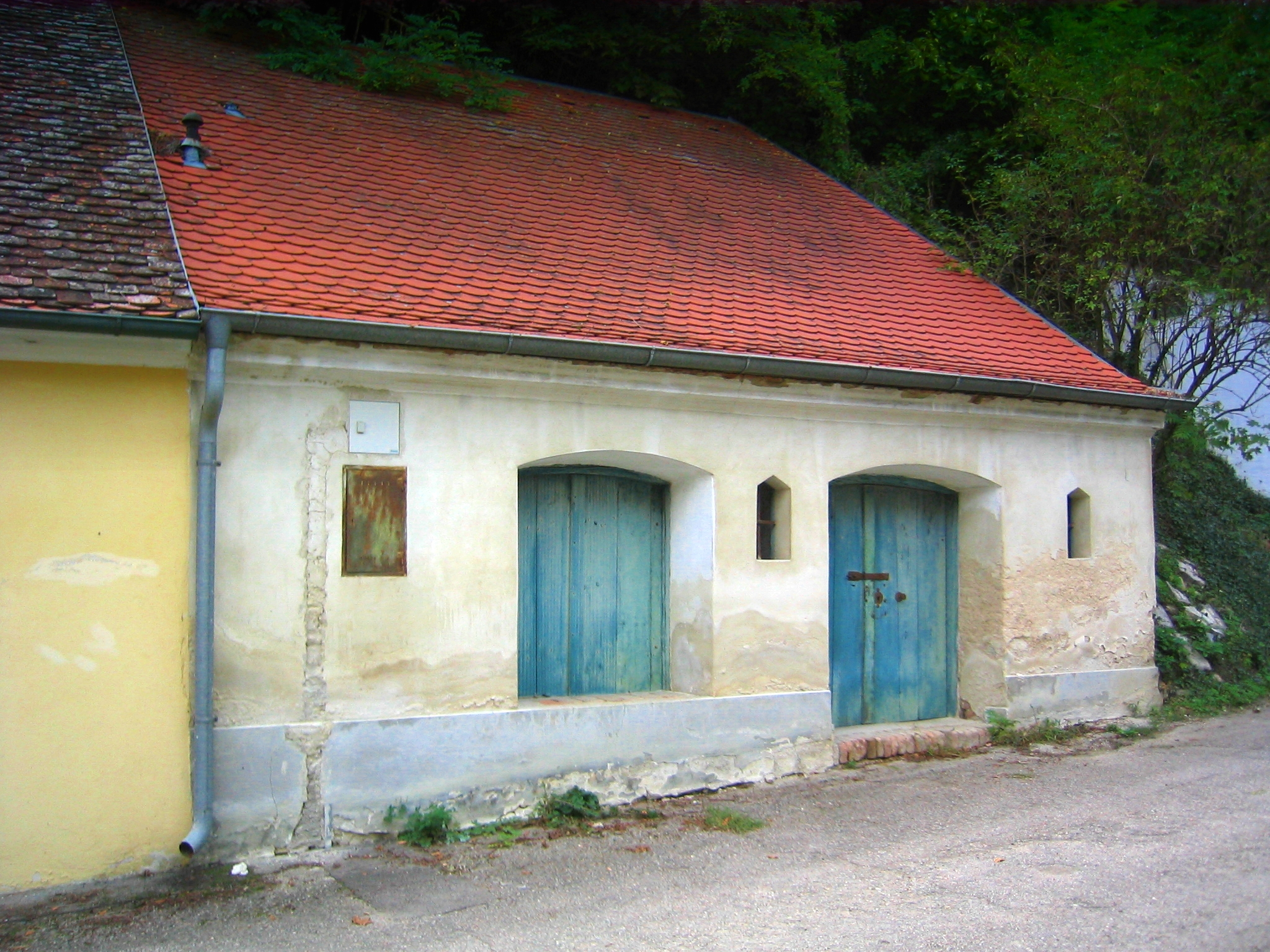 Mühlbergkellergasse Objekt 16